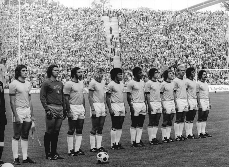 ADN-ZB-Mittelstädt-16.7.74-wen-München: X. Fußball-Weltmeisterschaft- Spiel um den dritten Platz Brasilien gegen VR Polen 0:1 am 6.7.74. Die Mannschaft Brasiliens vor Spielbeginn. Information added by Wikimedia users.